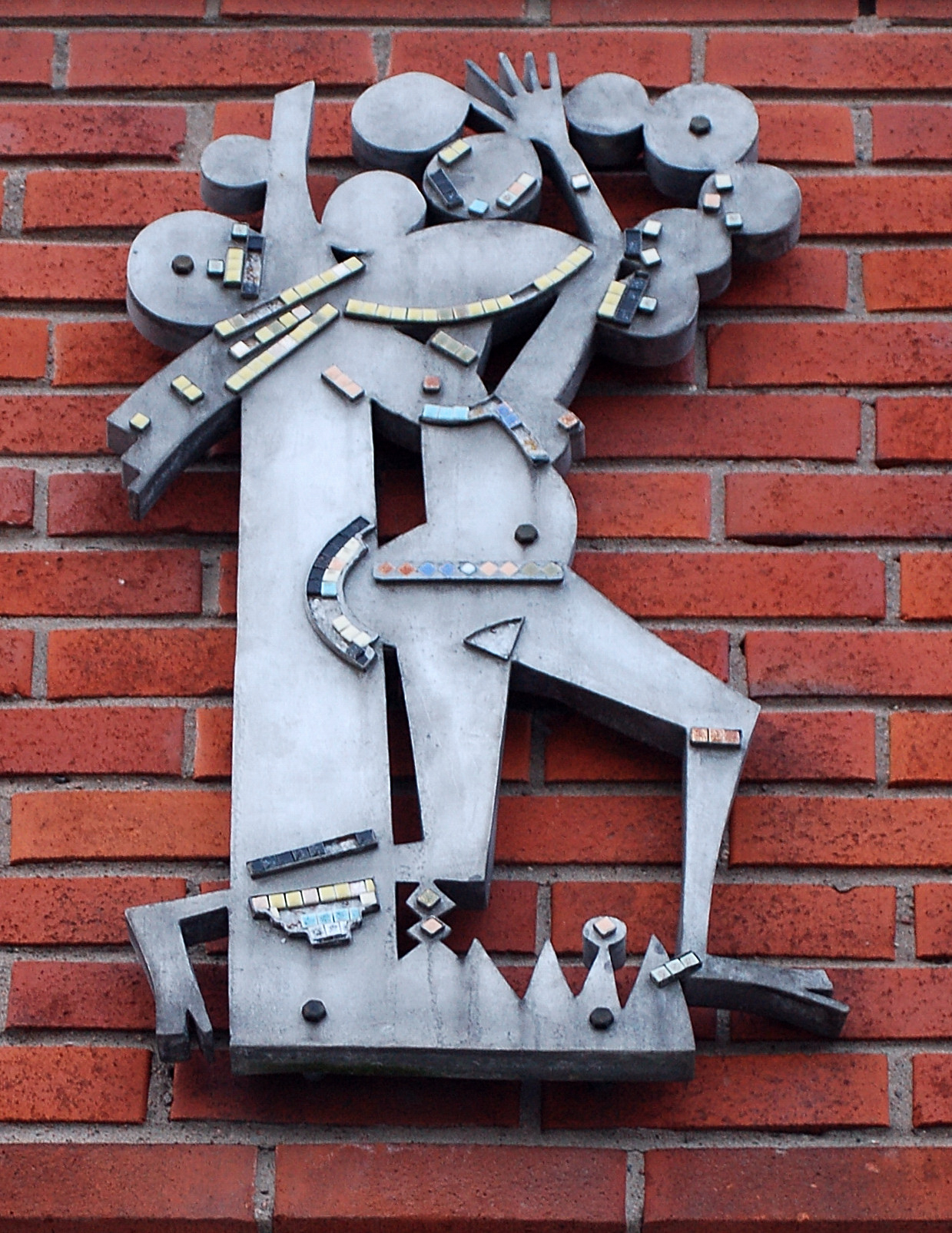 Livets gåvor. Nedbrytande krafter och balans av Axel Hennix, fasadutsmyckning på Hemvägen 13 i Våxnäs, Karlstad.